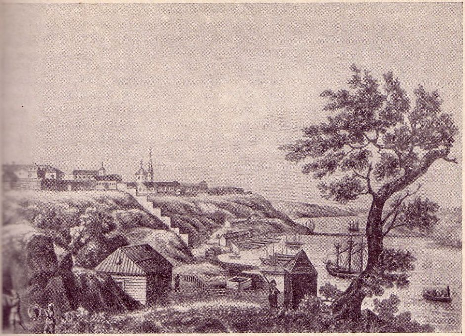 Общий вид города Николаева в конце XVIII века. Печатная гравюра Российской Империи.